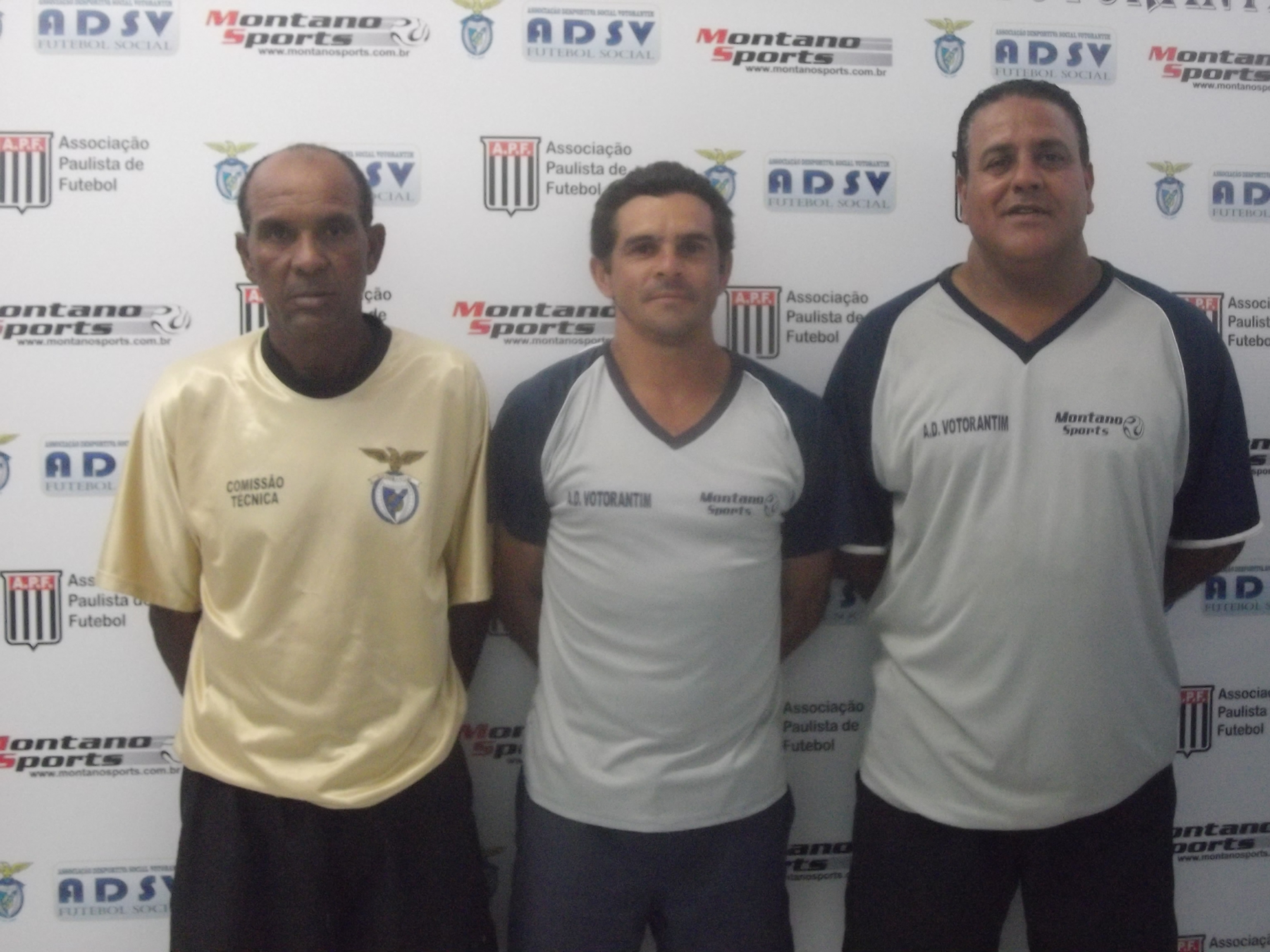 Comissão Técnica da Associação Desportiva Social Votorantim em novembro de 2011